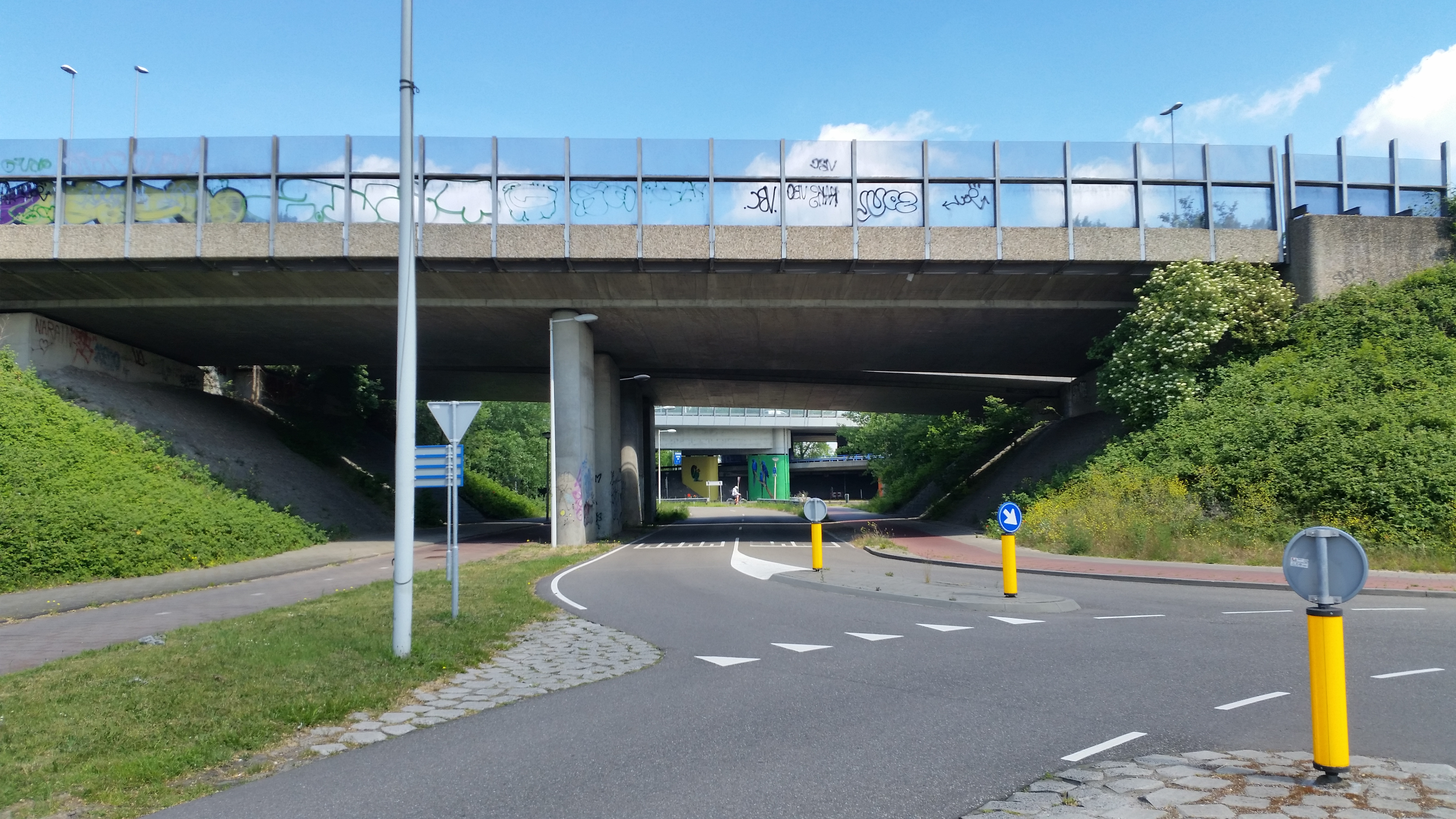 Zuidelijk viaduct in de afslag van de Betonbrug over de Rijksstraatweg in Duivendrecht